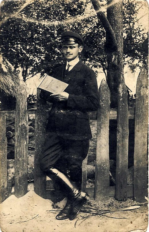 Działacz społeczny, twórca Gminnej Biblioteki Publicznej w Latowiczu.